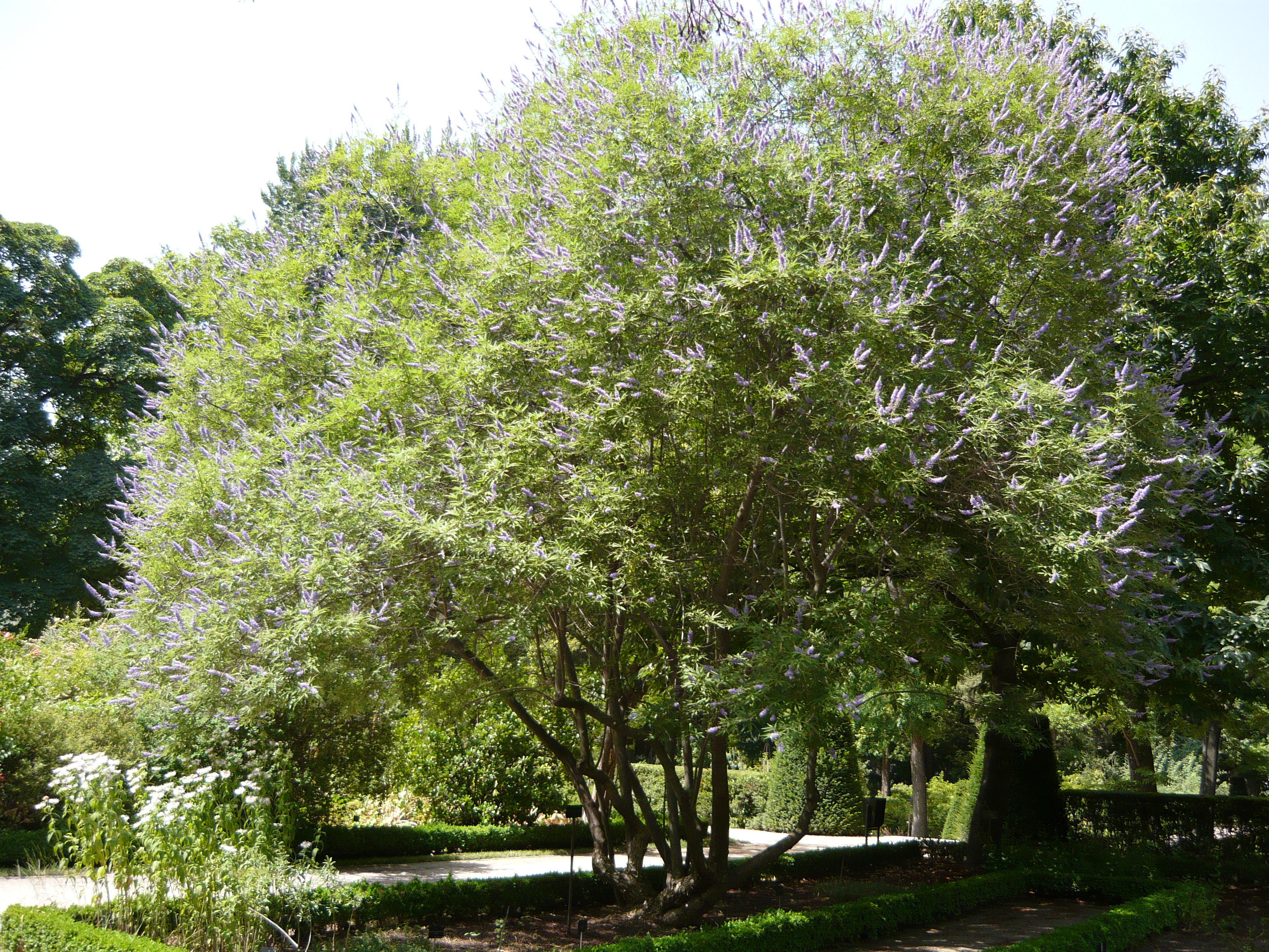 Vitex agnus-castus. Real Jardín Botánico de Madrid.